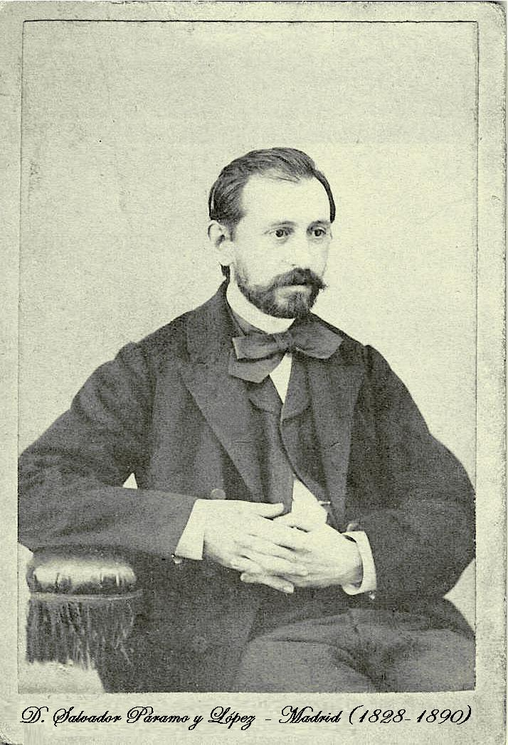 Foto familiar del escultor madrileño D.Salvador Páramo y López (1828-1890)